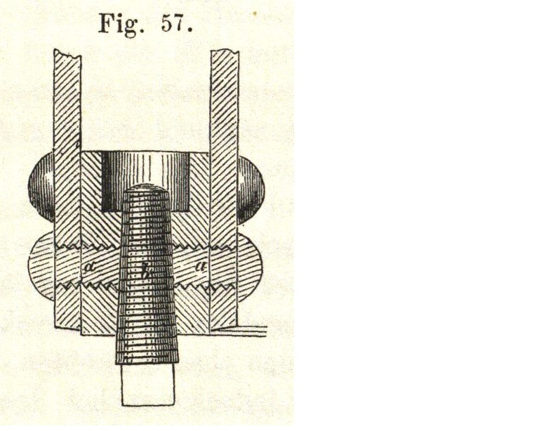 prinzipielle Darstellung eines Schmelzpropfens aus einer alten Zeichnung